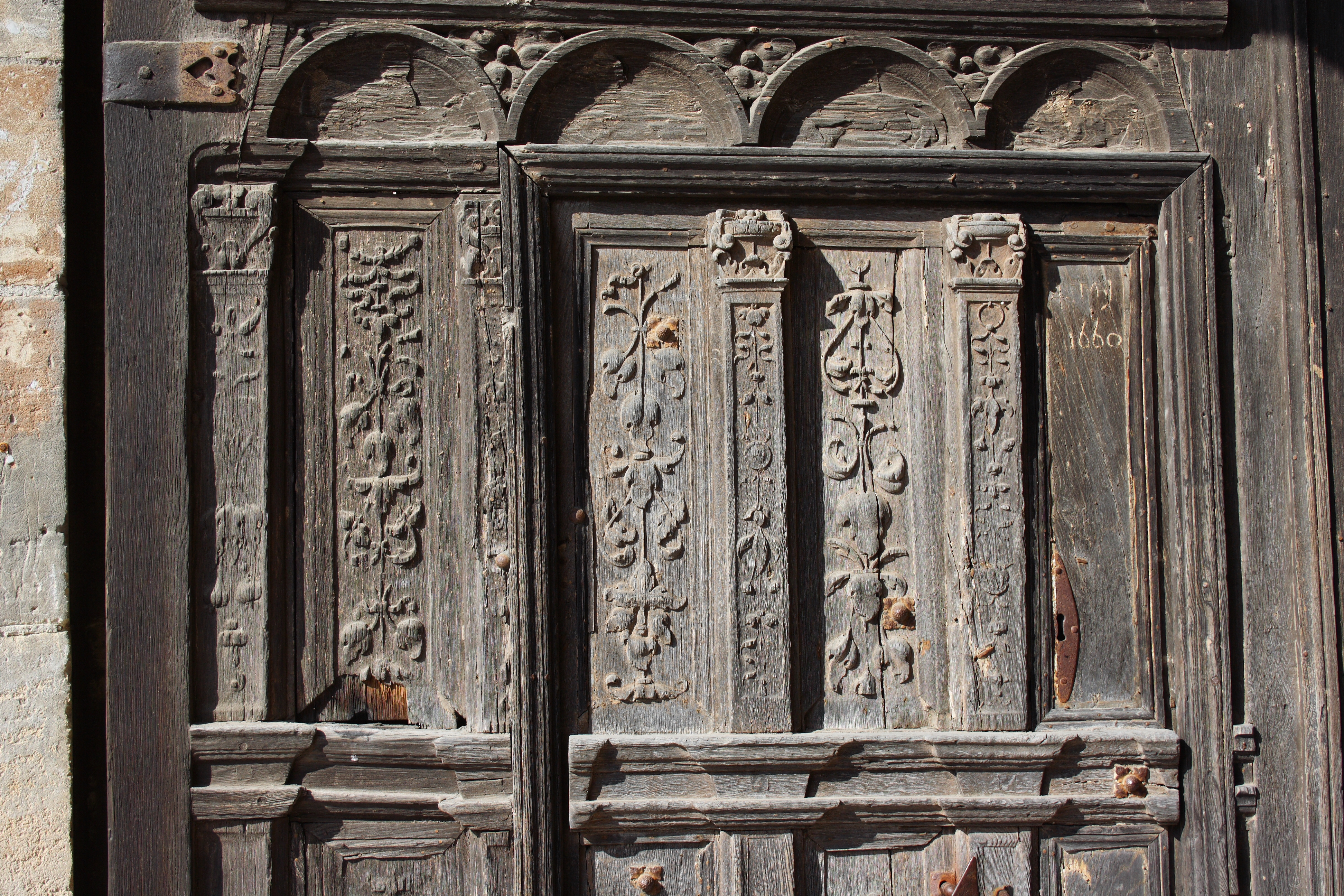 Tür der Kirche Notre-Dame-de-la-Nativité in Magny-en-Vexin